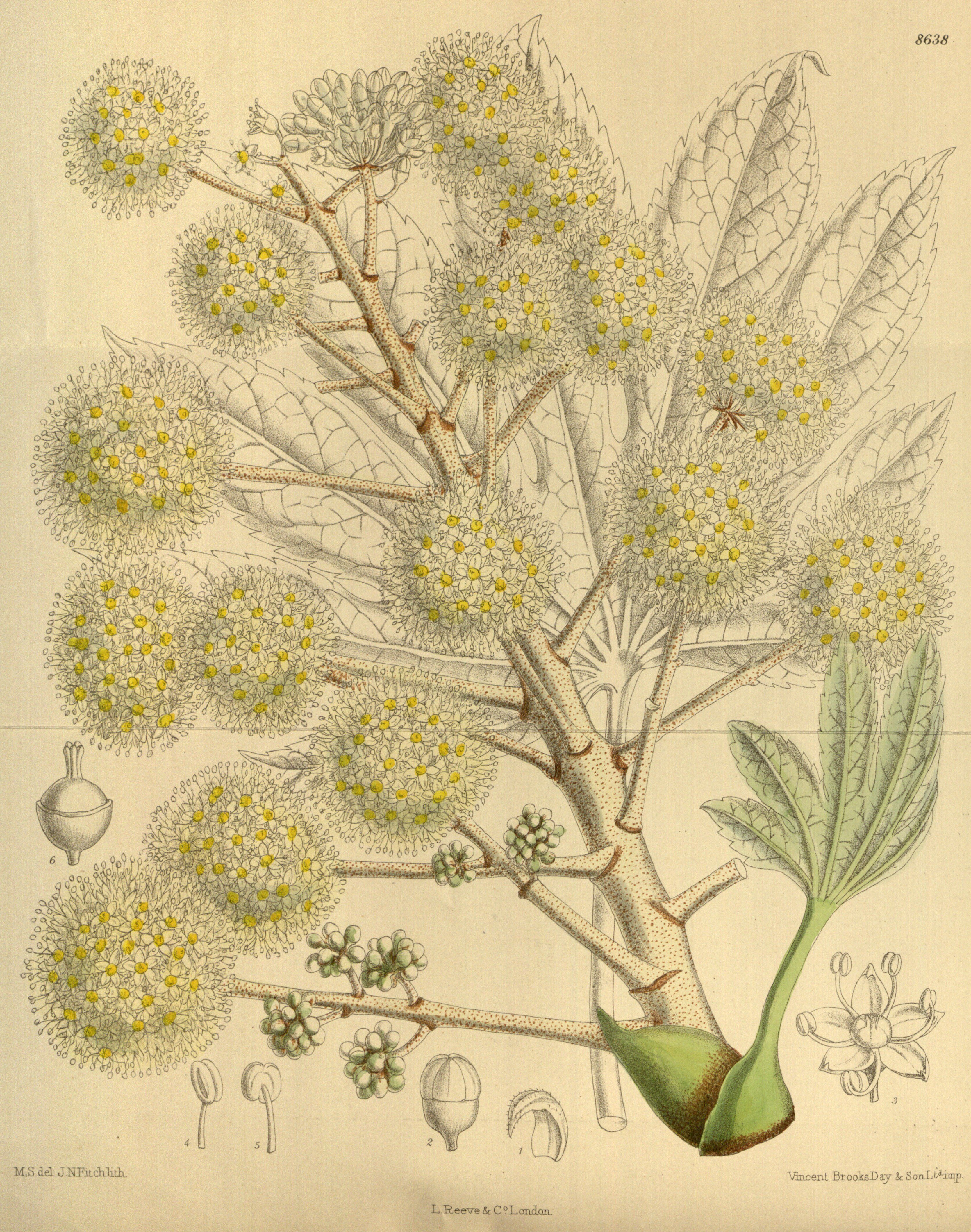 Fatsia japonica, Araliaceae